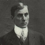 Foto del primer avidor español, Antonio Fernández Santillana